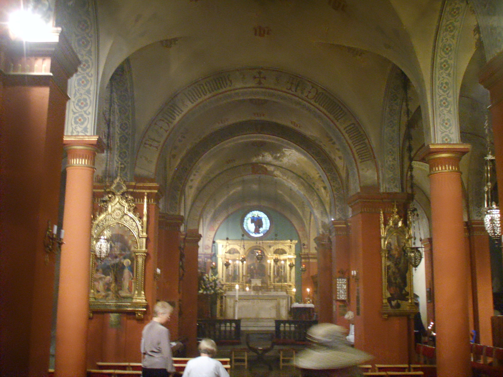 Chiesa anglicana di Saint Mark, a Firenze.